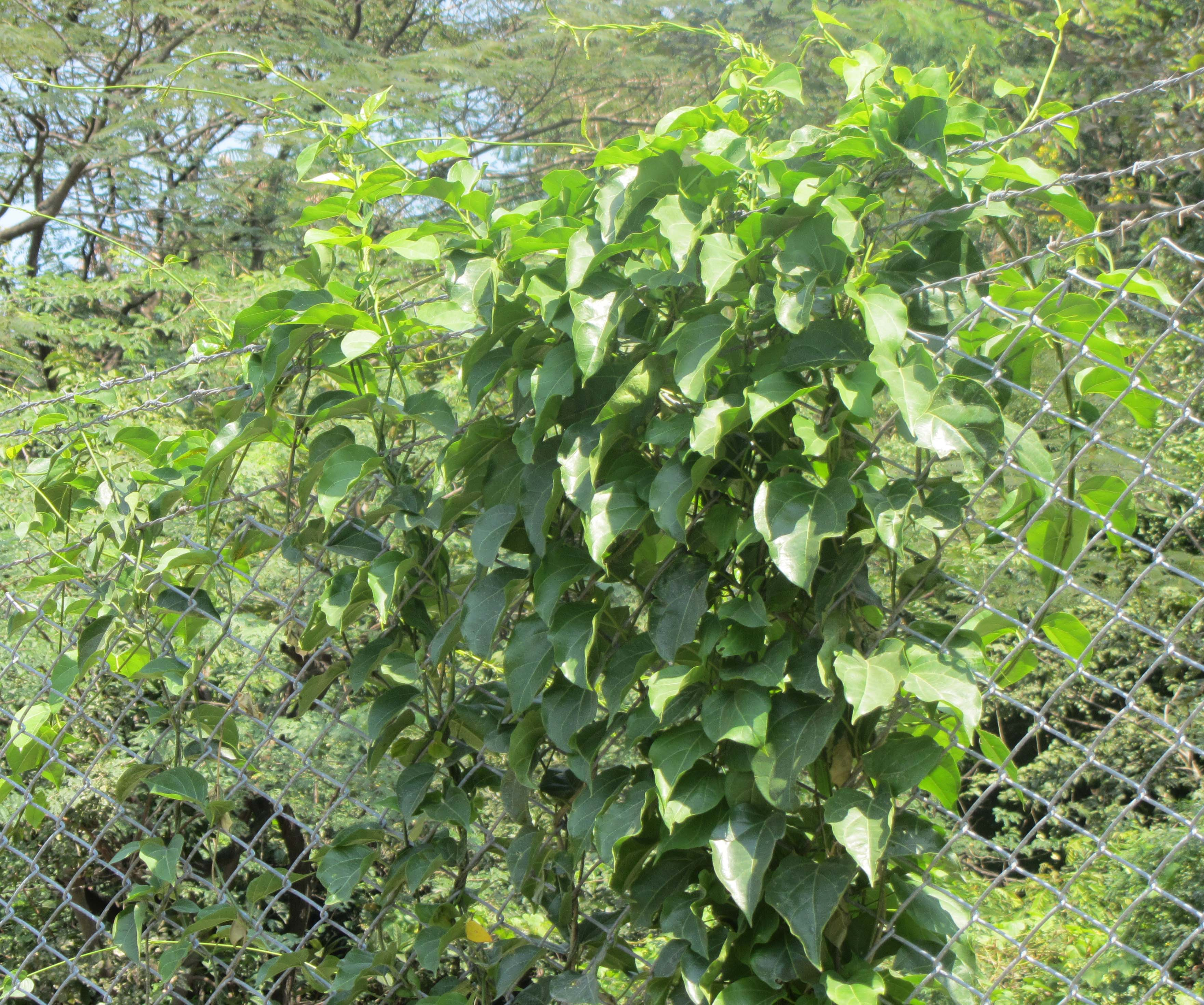 பாலக்கொடி, பால் உள்ள கொடி ஆதலால் இதனைப் பாலக்கொடி என்கின்றனர். இதனை ஒடித்து அதில் வரும் பாலை மூக்கில் உரிஞ்சி மூக்கடைப்புச் சளியைப் போக்கிக்கொள்வர். - own shot.